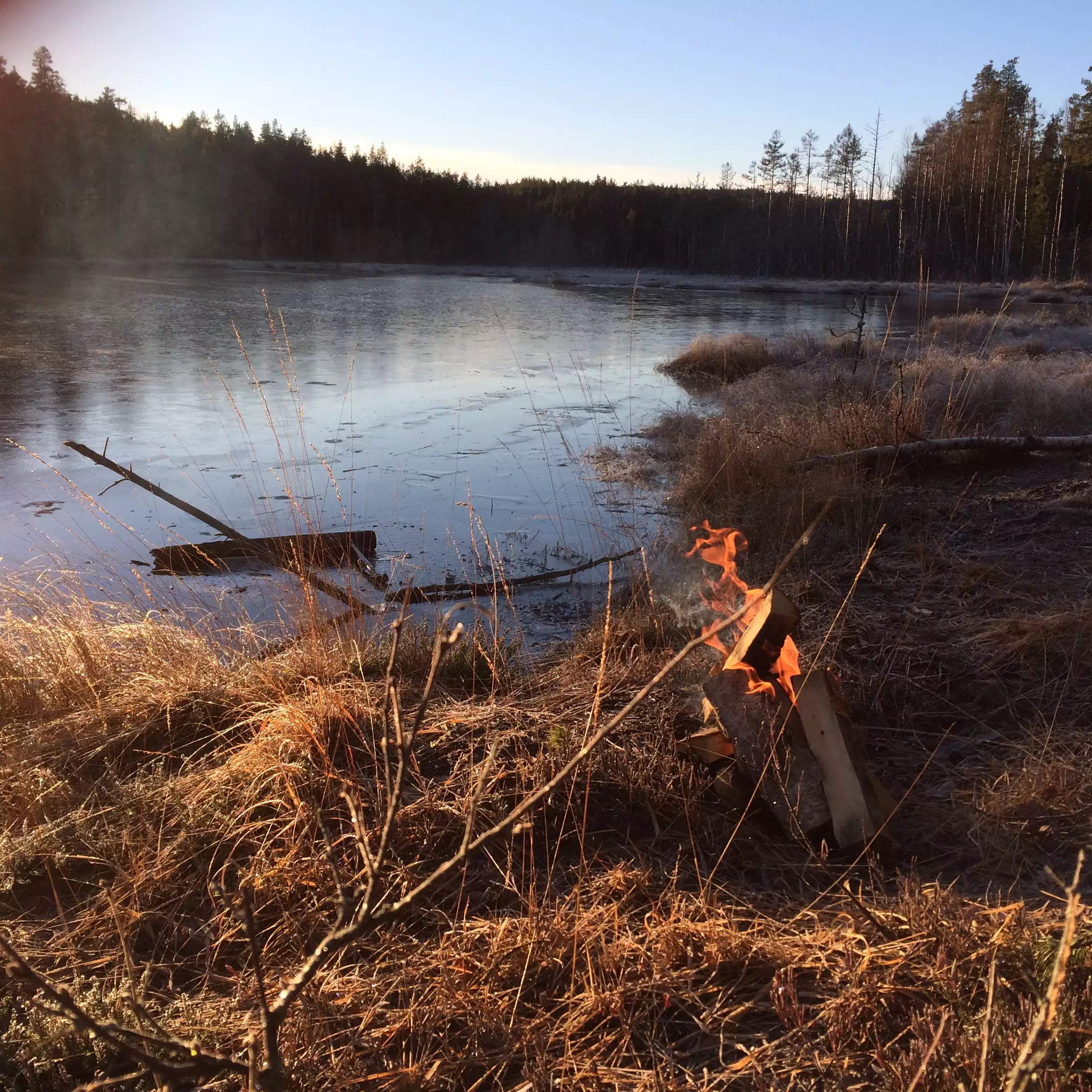 Nordre Ertetjennet på Lierfoss i Aurskog-Høland kommune.